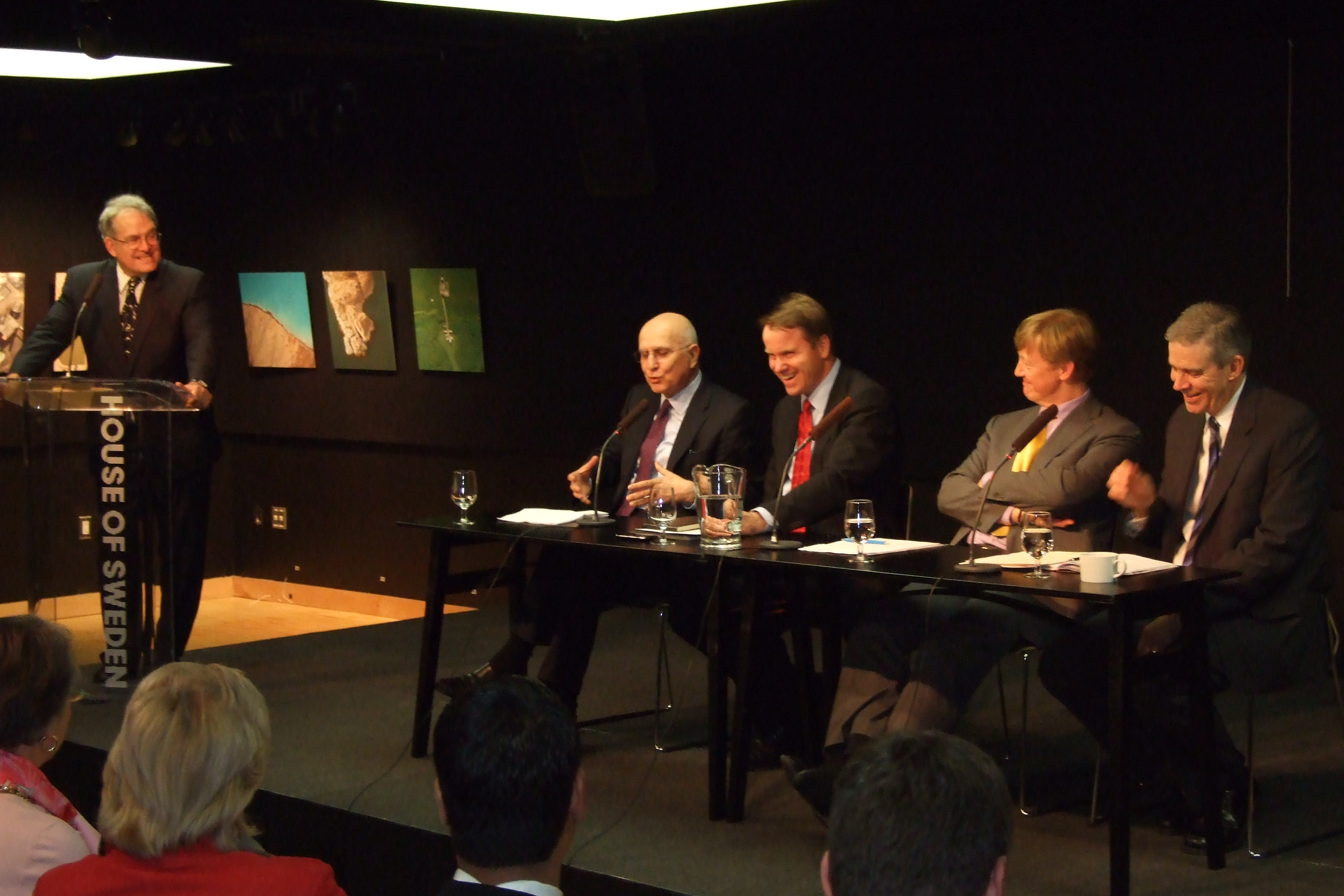 House of Sweden EU Troika